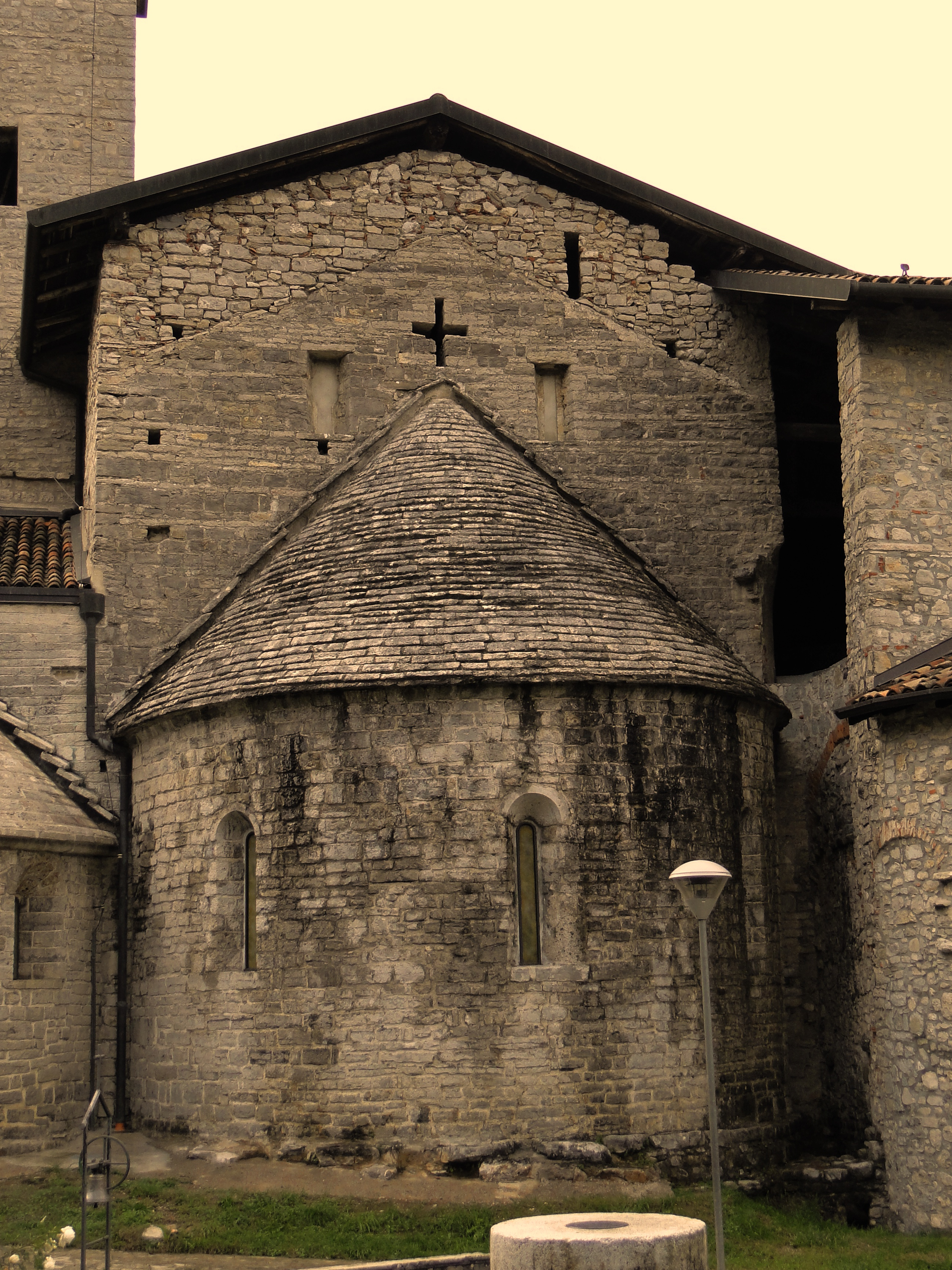 Abbazia san Benedetto in Vallalta, Abbazia di Albino (BG). Abside centrale con corpo centrale della chiesa